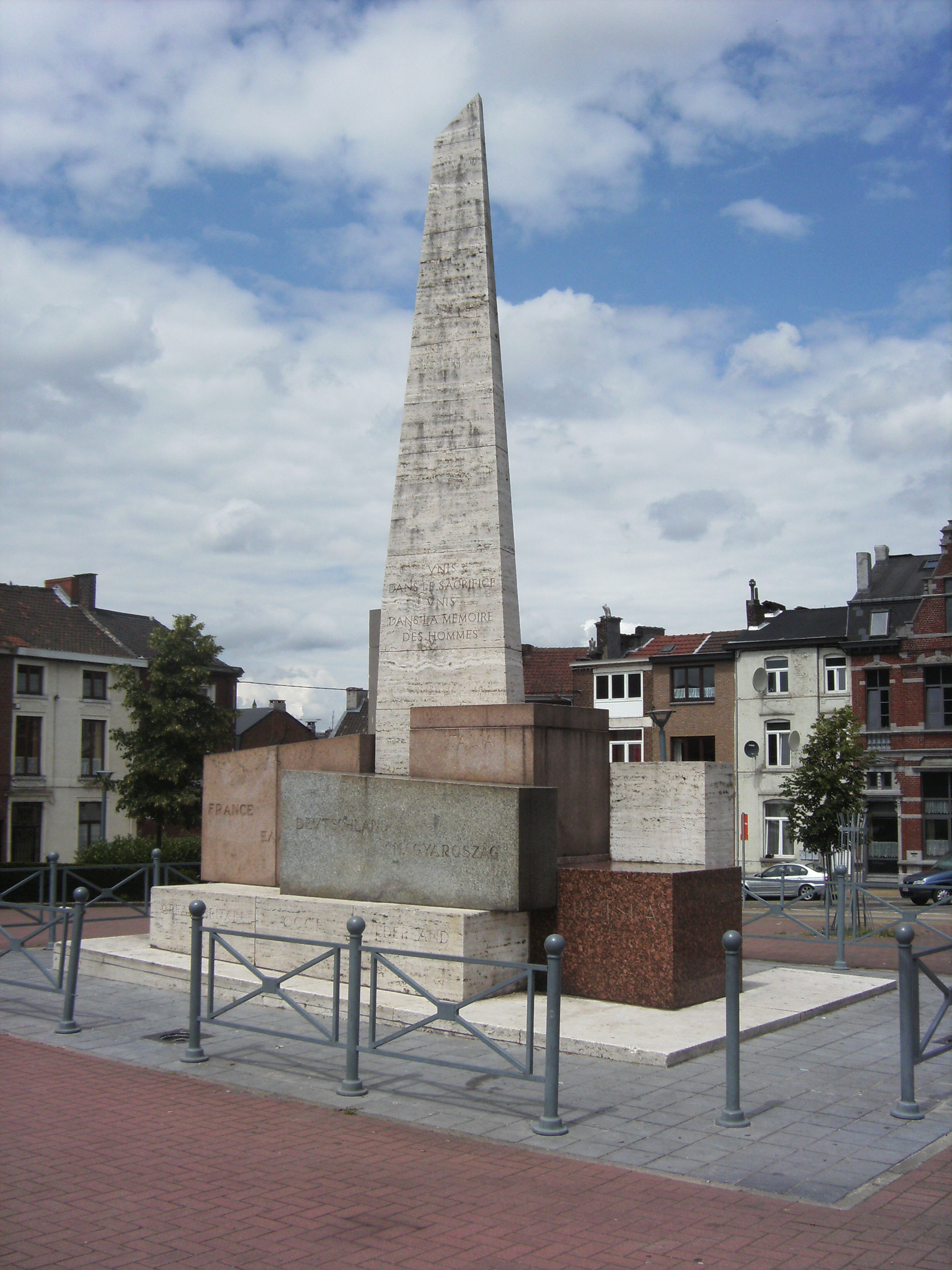 Marcinelle (Charleroi-Belgique) - Grand'Place - Mémorial aux victimes de la catastrophe du Bois-du-Cazier.